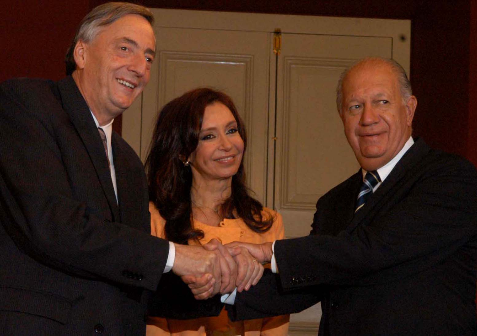 Néstor Kichner, Cristina Fernández de Kirchner y Ricardo Lagos durante la visita oficial del Presidente Kirchner a Chile para la asunción del Presidente Lagos.